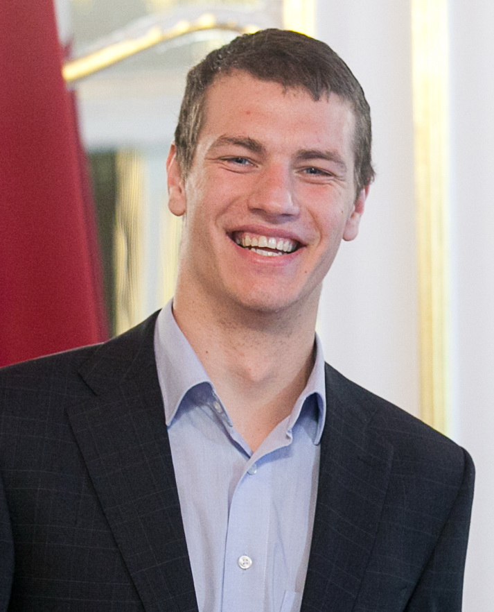 Miks Indrašis